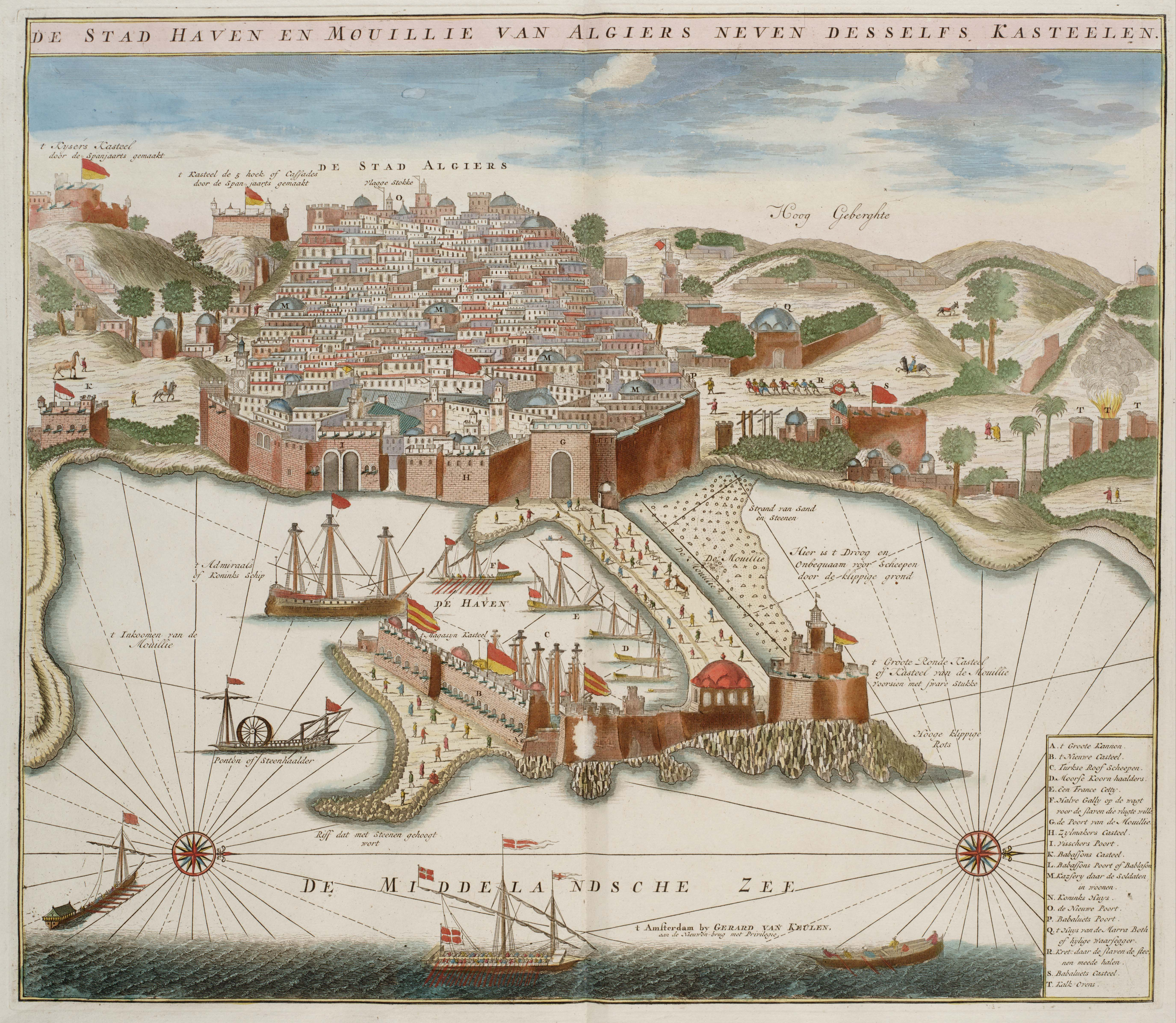 Gravure ancienne hollandaise. "De Stad Haven En Mouillie Van Algiers Neven Desselfs Kasteelen" (la cité, le port et le môle d'Alger)